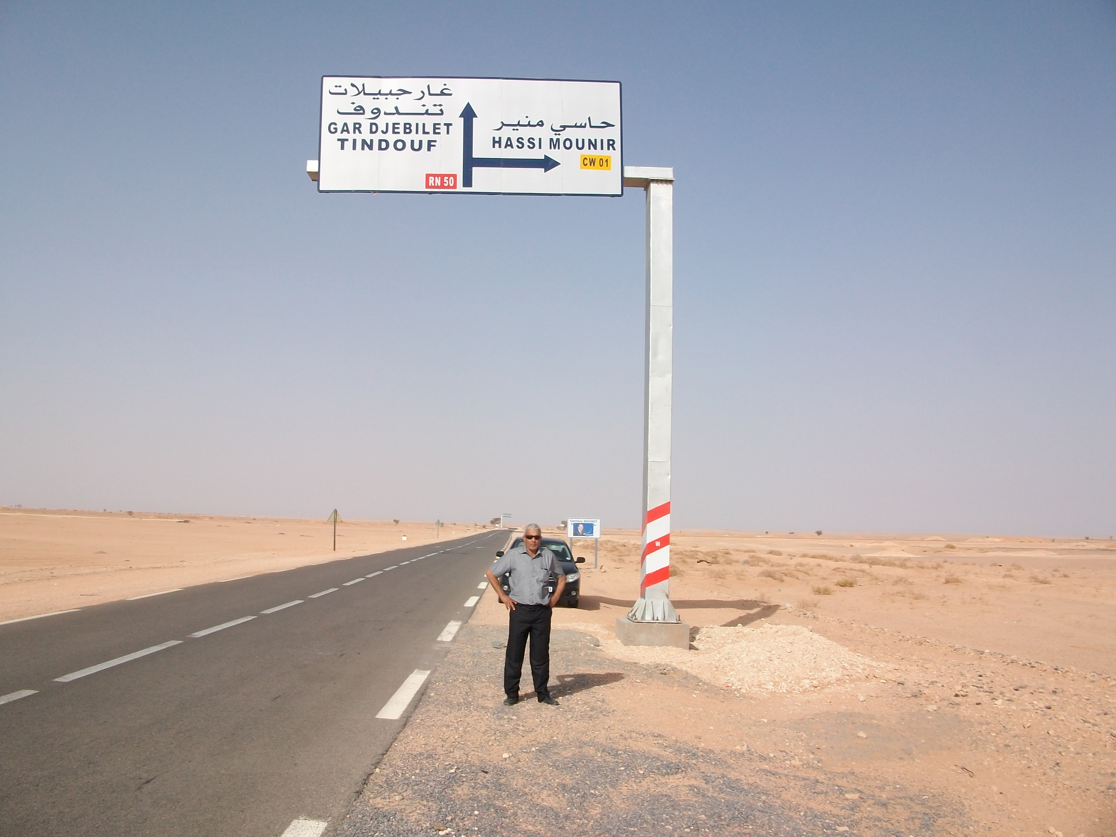 Français cadien: entrée de la ville de Tindouf